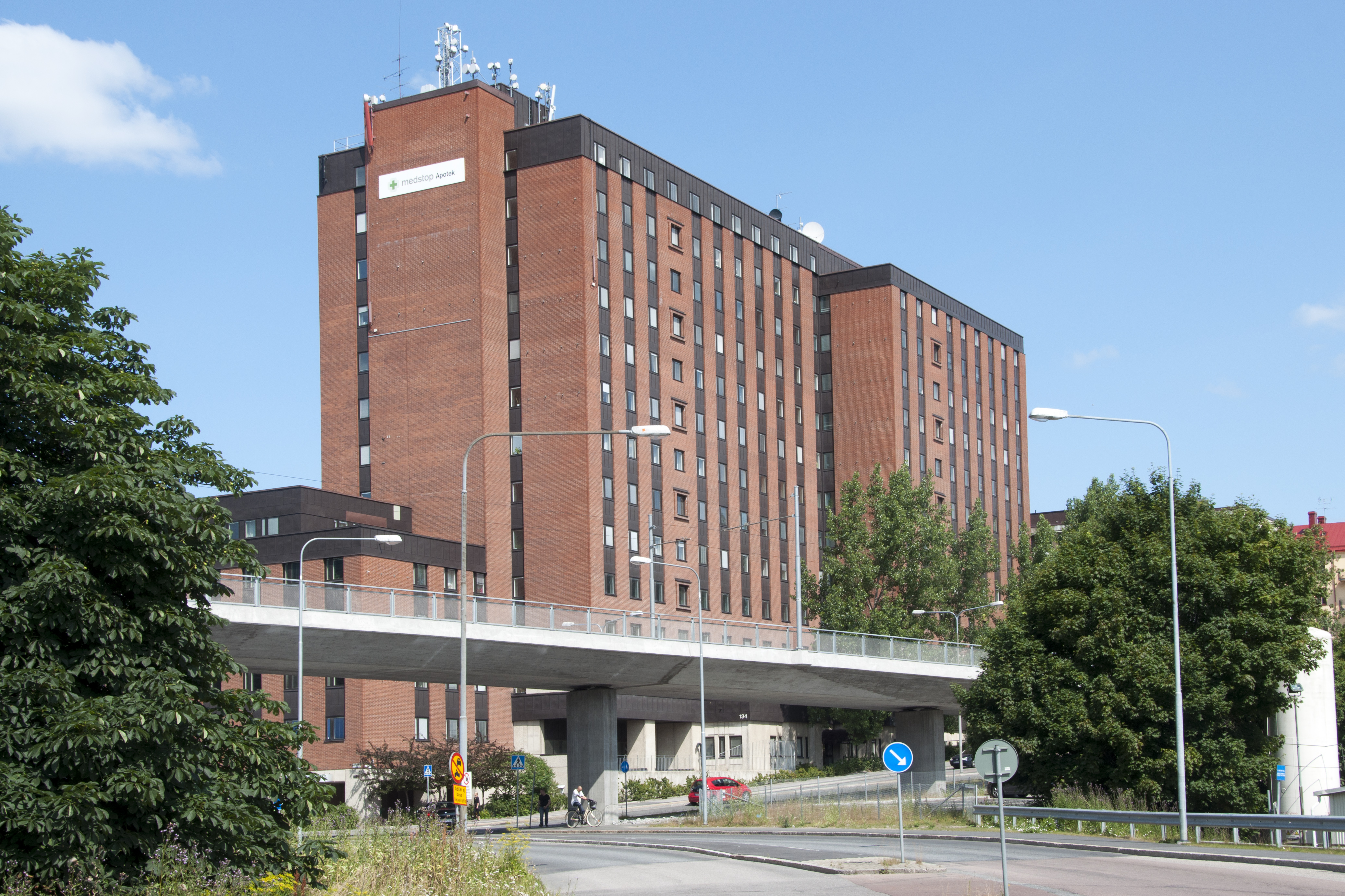 Kronan 1, Sundbyberg. Byggnadsår 1981. Arkitekt Åke Östin